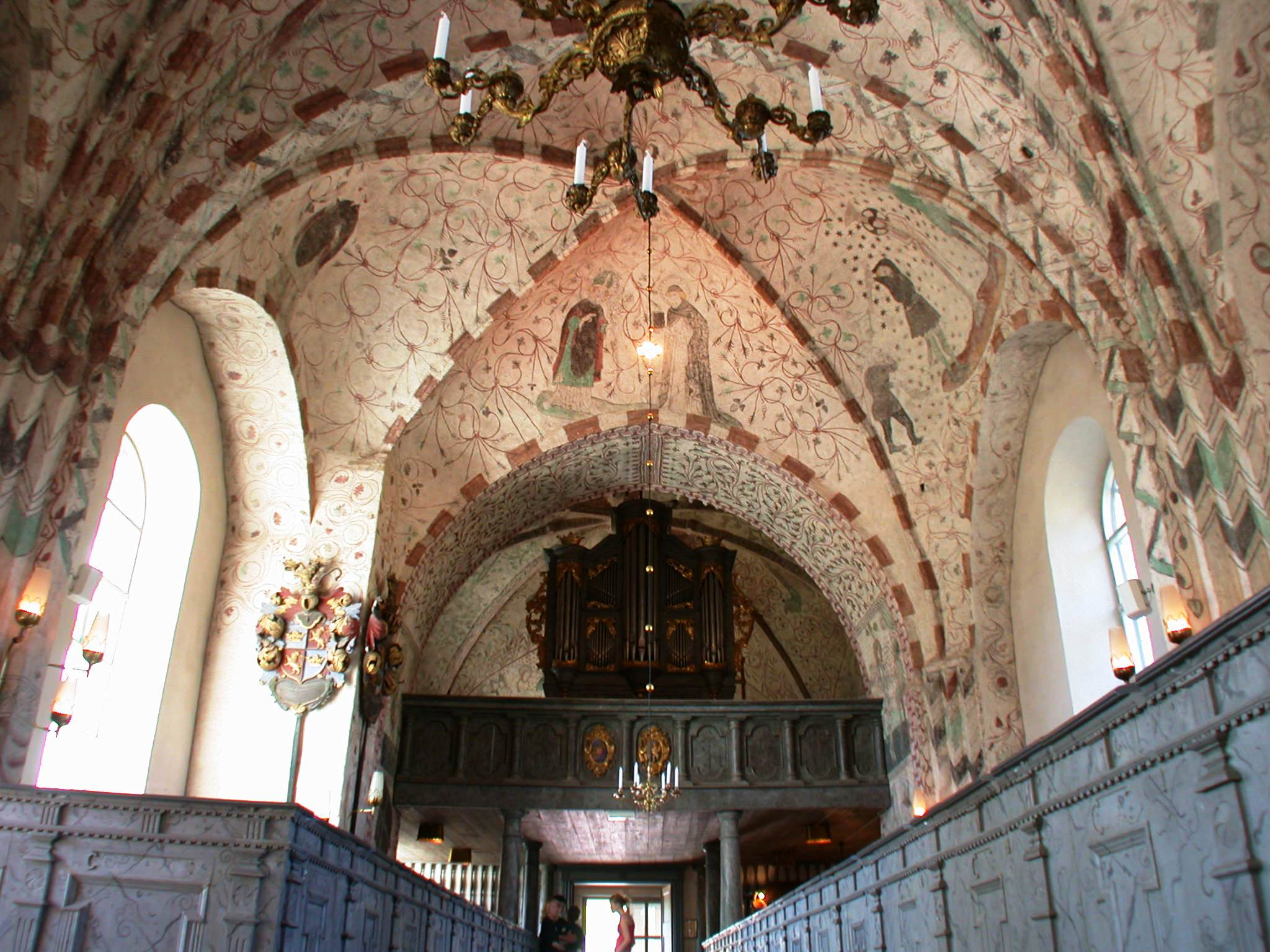 Björklinge church, Uppsala, Sweden